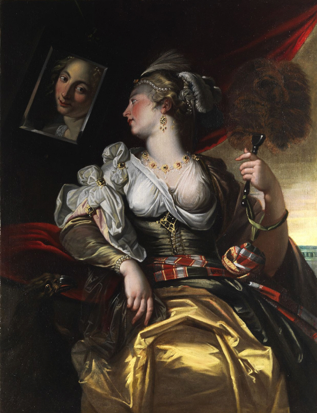 wohl aus einer Serie mit Allegorien der fünf Sinne